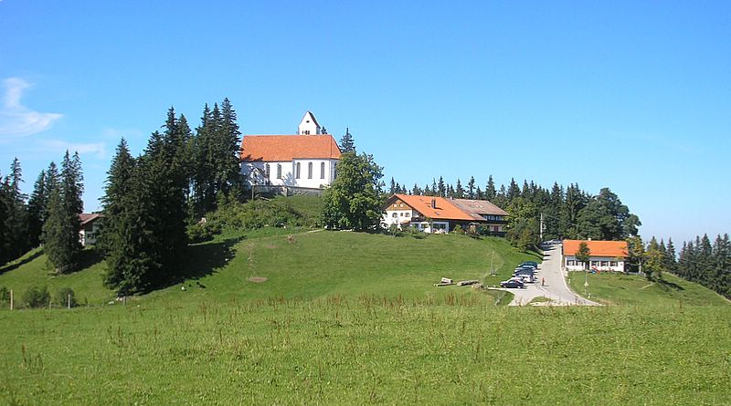 Filialkirche St. Georg auf dem Auerberg (Landkreis Weilheim-Schongau, Oberbayern). Gesamtansicht von Süden. Eigene Aufnahme, Sept. 2006 / St. George on the Auerberg near Schongau, Upper Bavaria, Germany. Total view from the south. Own photo, Sept 2006